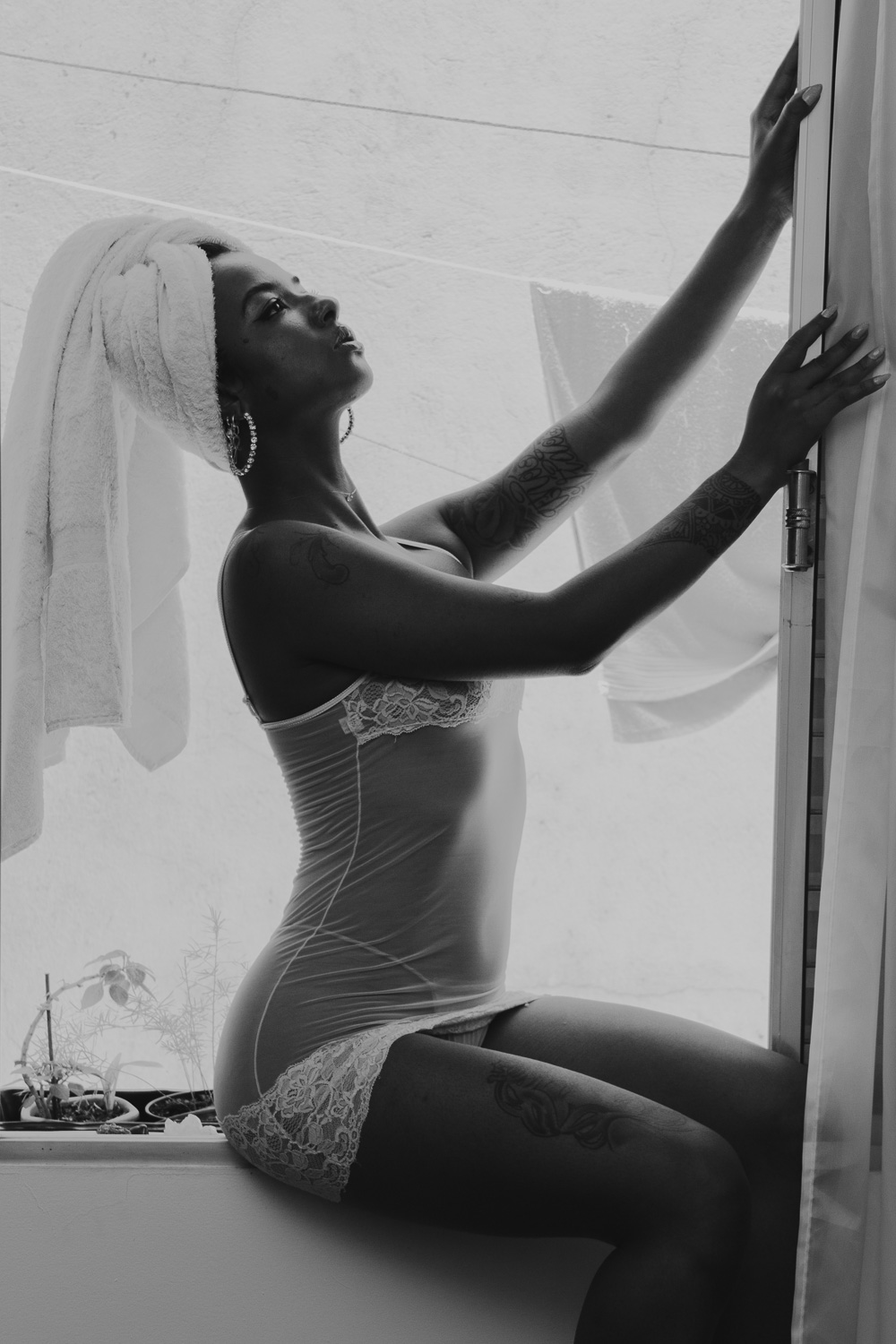 Fotografia por Marcelo F.